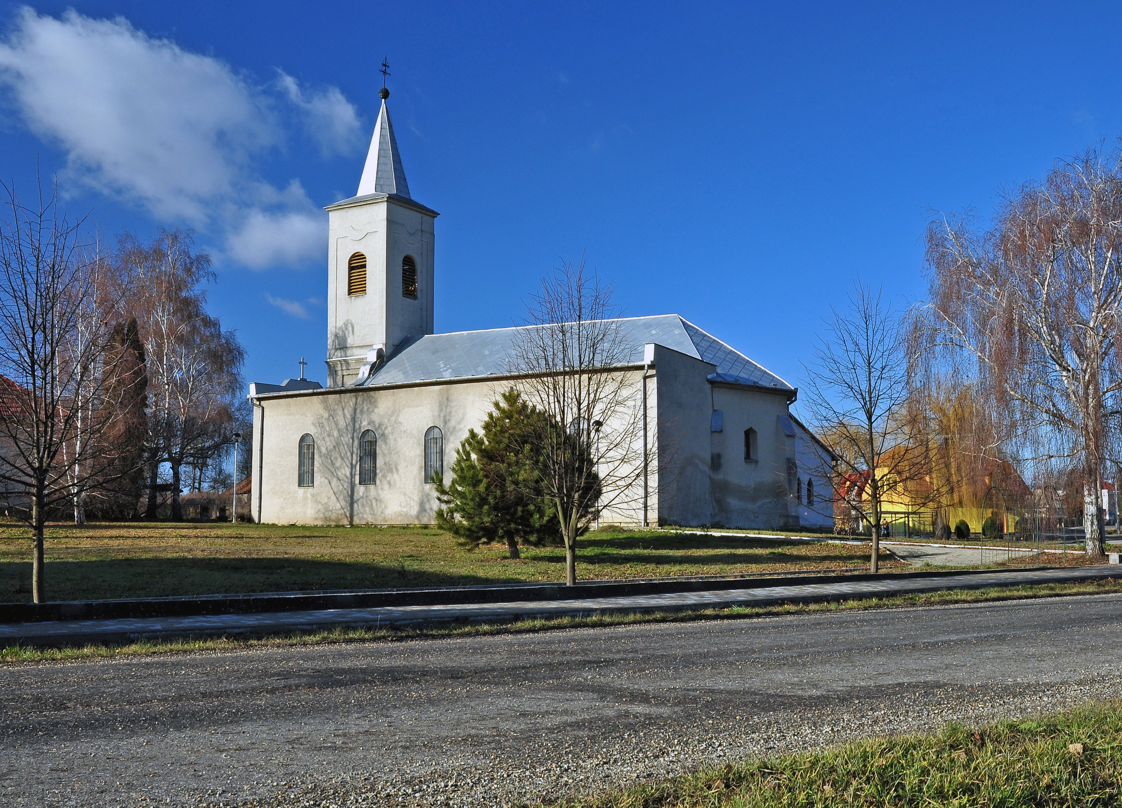 Dolný Pial, kostol, Slovensko